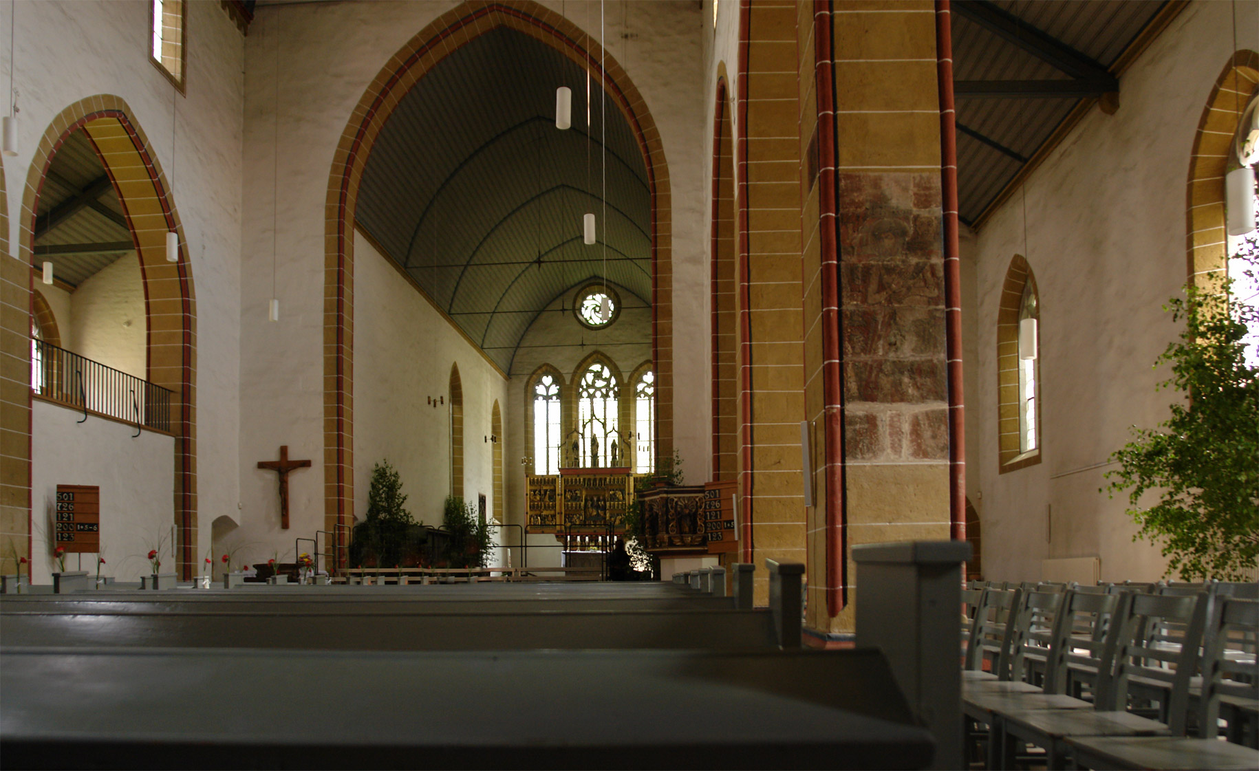 streng geheim. Verbesserungvorschlag.